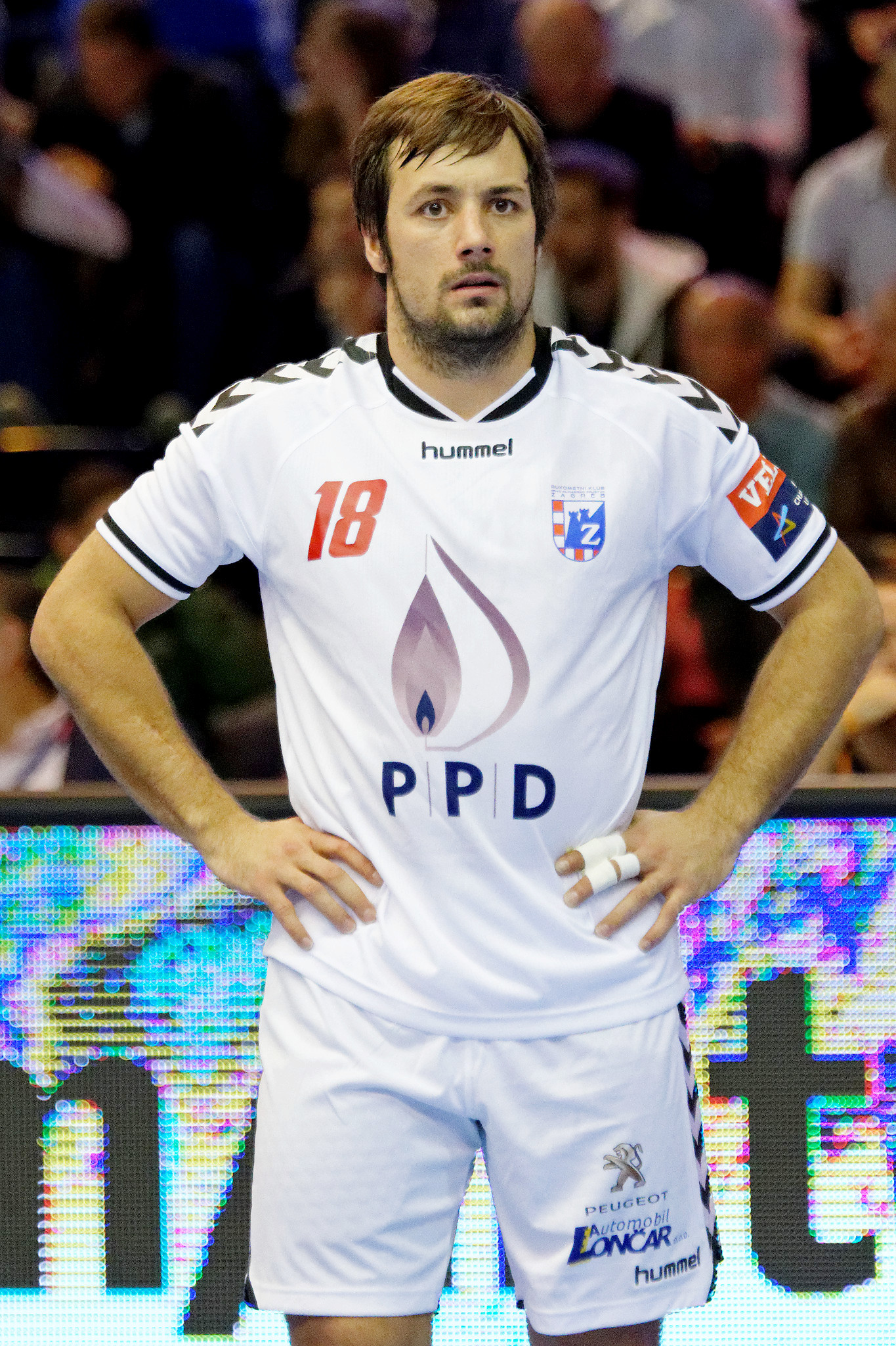 Rencontre de phase de groupe de la ligue des champions 2015-16 entre le PSG et le RK Zagreb. A la Halle Carpentier (Paris), le 11 ocotbre 2015.